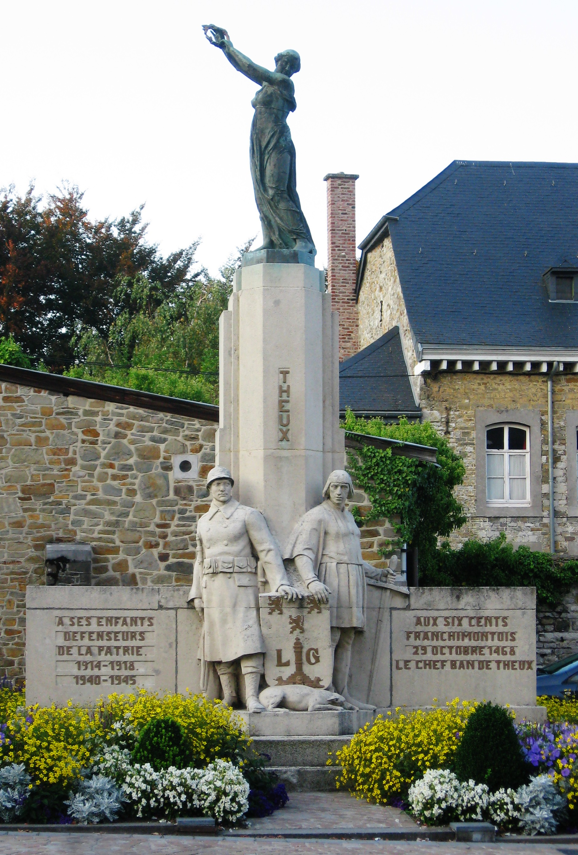 Kriegerdenkmal in Theux